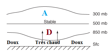 Coupe verticale pression versus hauteur des isohypses (surfaces isobares) dans une dépression froide. Bien que la pression réduite au niveau de la mer puisse atteindre couramment des valeurs faibles au centre d'une dépression thermique, une telle dépression a généralement une épaisseur réduite et se transforme en un anticyclone en altitude : en effet, on explique en météorologie que la différence de hauteur entre deux surfaces isobares sur une verticale donnée est d'autant plus forte que les températures de la couche atmosphérique comprise entre ces deux surfaces sont en moyenne plus élevées suivant cette verticale : par suite, dans un air très chaud, la dépression s'amenuise lorsqu'on gagne en hauteur, jusqu'à s'inverser et finalement saillir en un anticyclone.